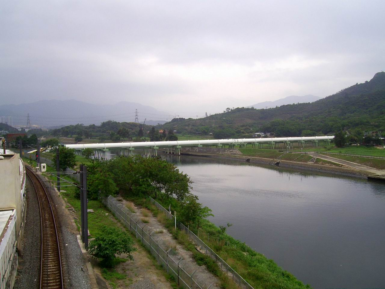 橫跨深圳河的东深供水工程輸水管